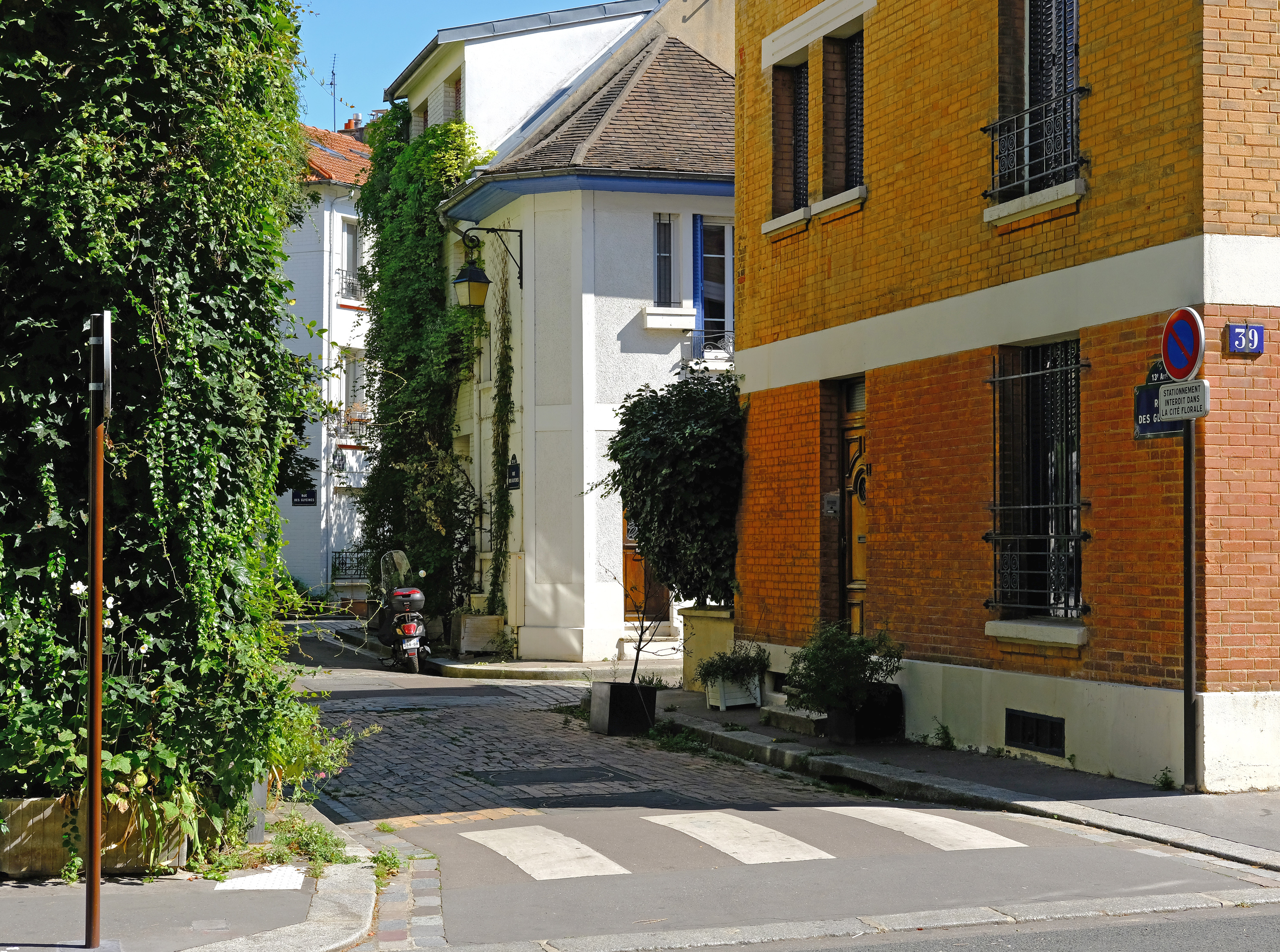 Cité florale (rue des Glycines) - Paris XIII